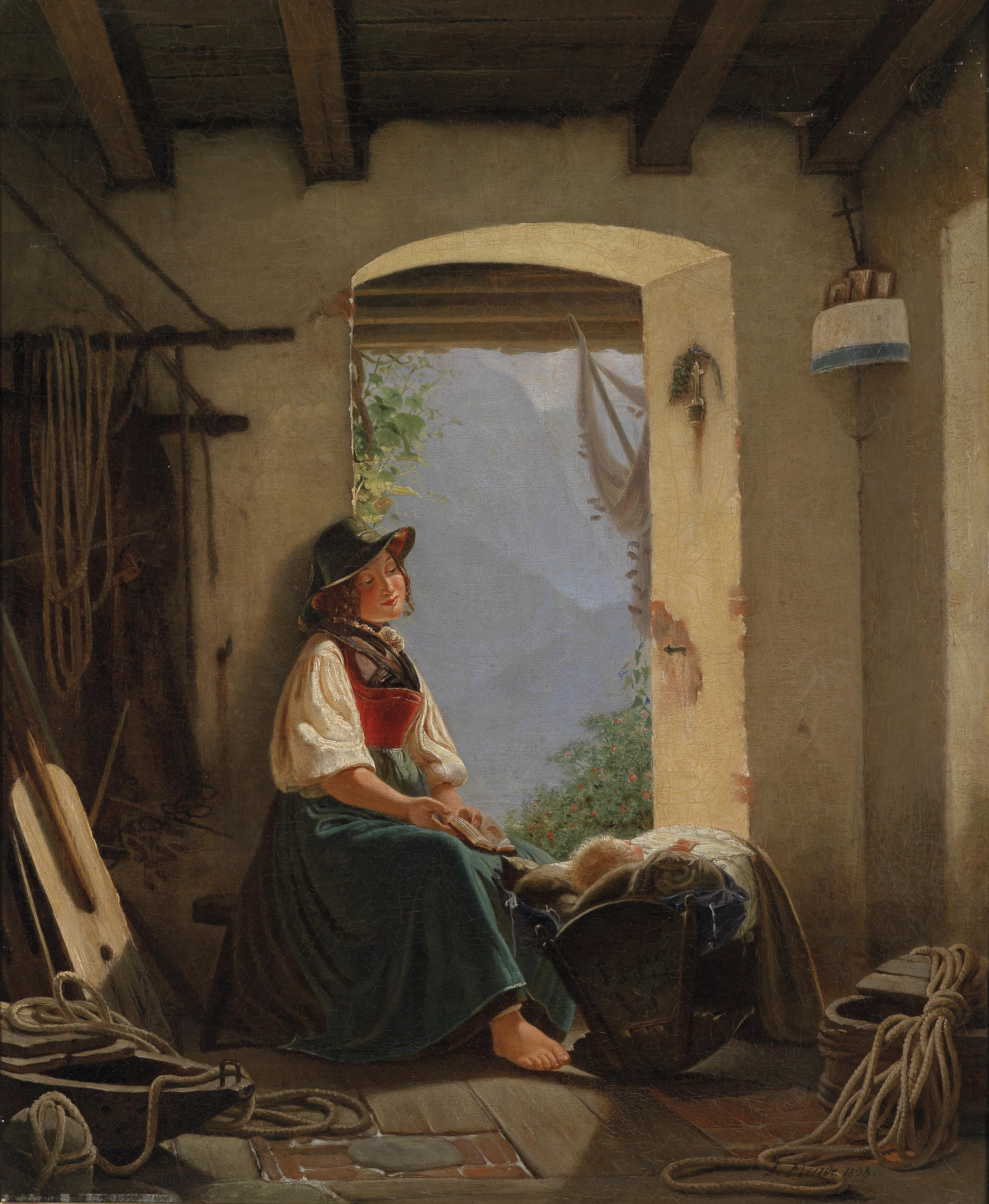 Mutterglück, signiert und datiert A. Mende 1838, Öl auf Leinwand, 56 x 44,5 cm